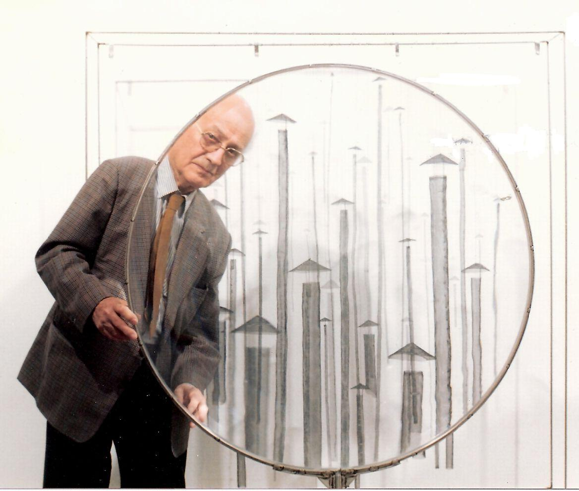 Ο Γιώργος Ζογγολόπουλος με το έργο του "Φακός με καμινάδες" σε ατομική του έκθεση στην Γκαλερί Bernier, 1990